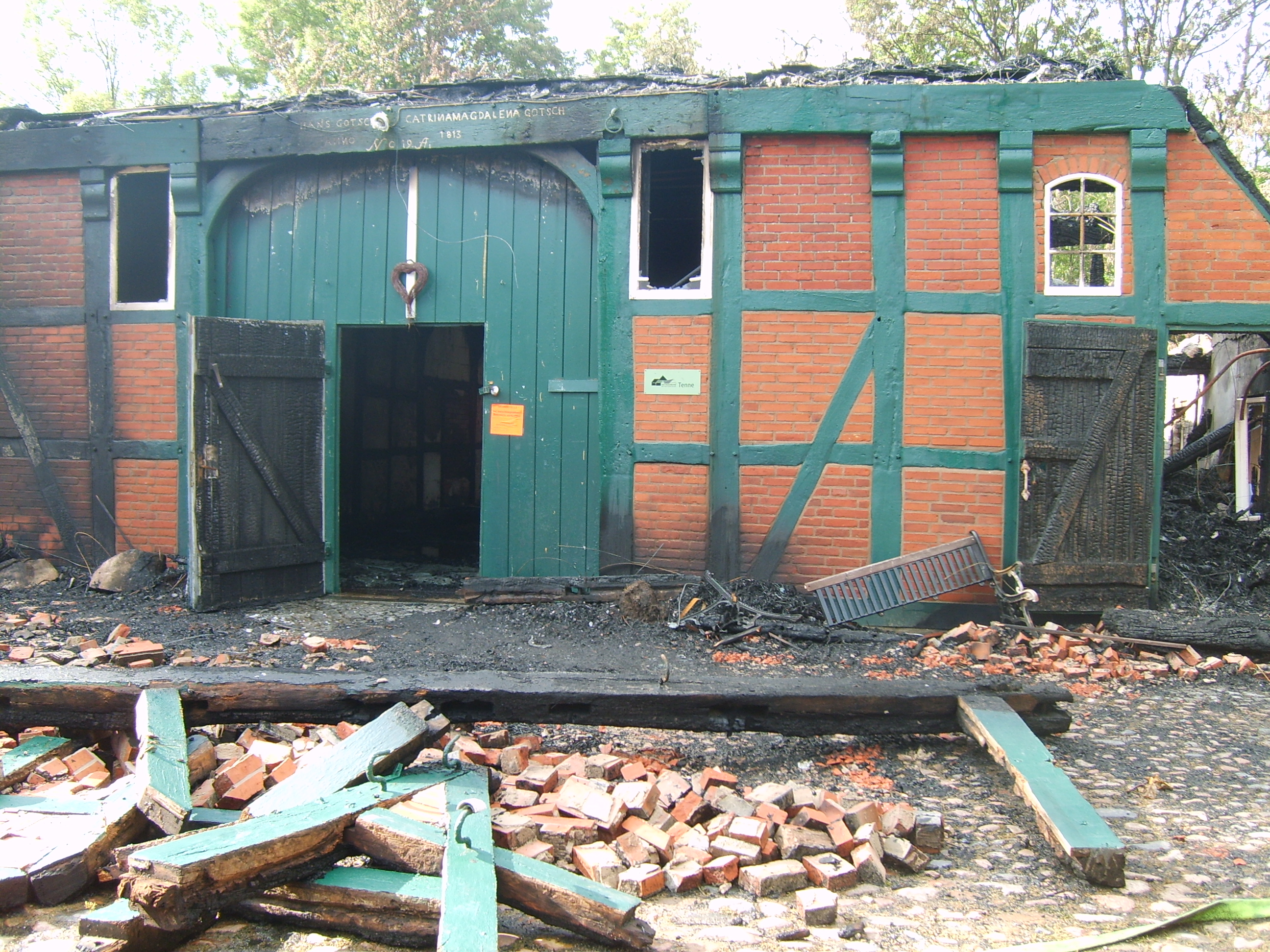 Hof Akkerboom abgebrannt